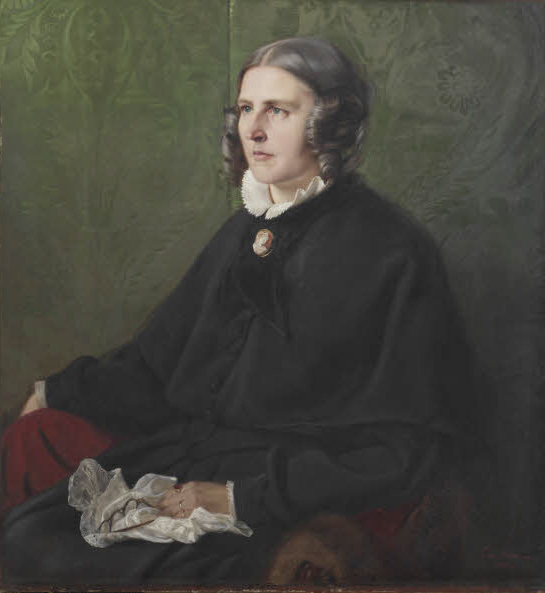 Porträt der Amalie Hassenpflug (1800–1871); entstanden 1848 in Hannover